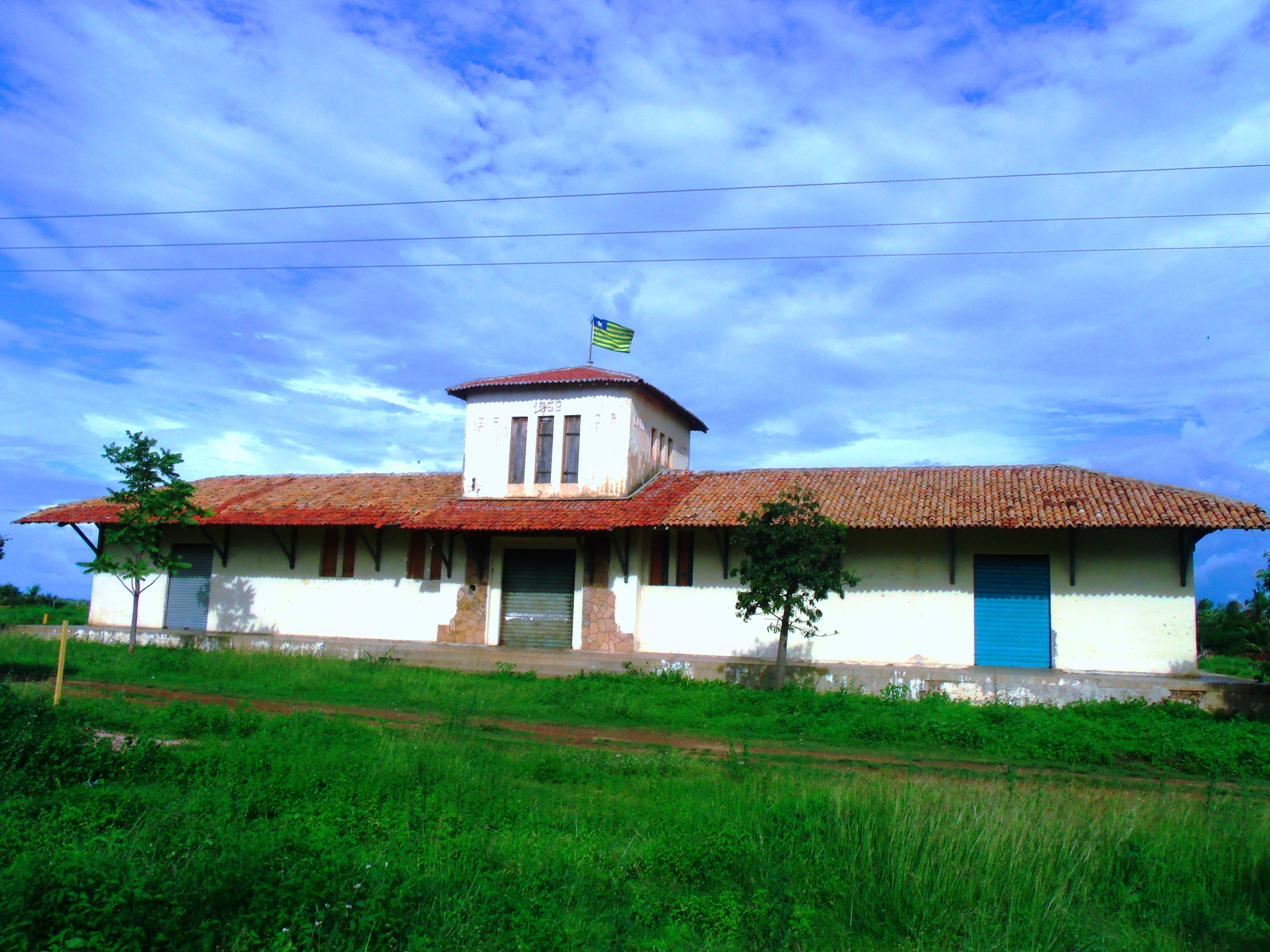 Bandeira do estado do Piauí no cimo do minarete da estação ferroviária de Campo Maior.